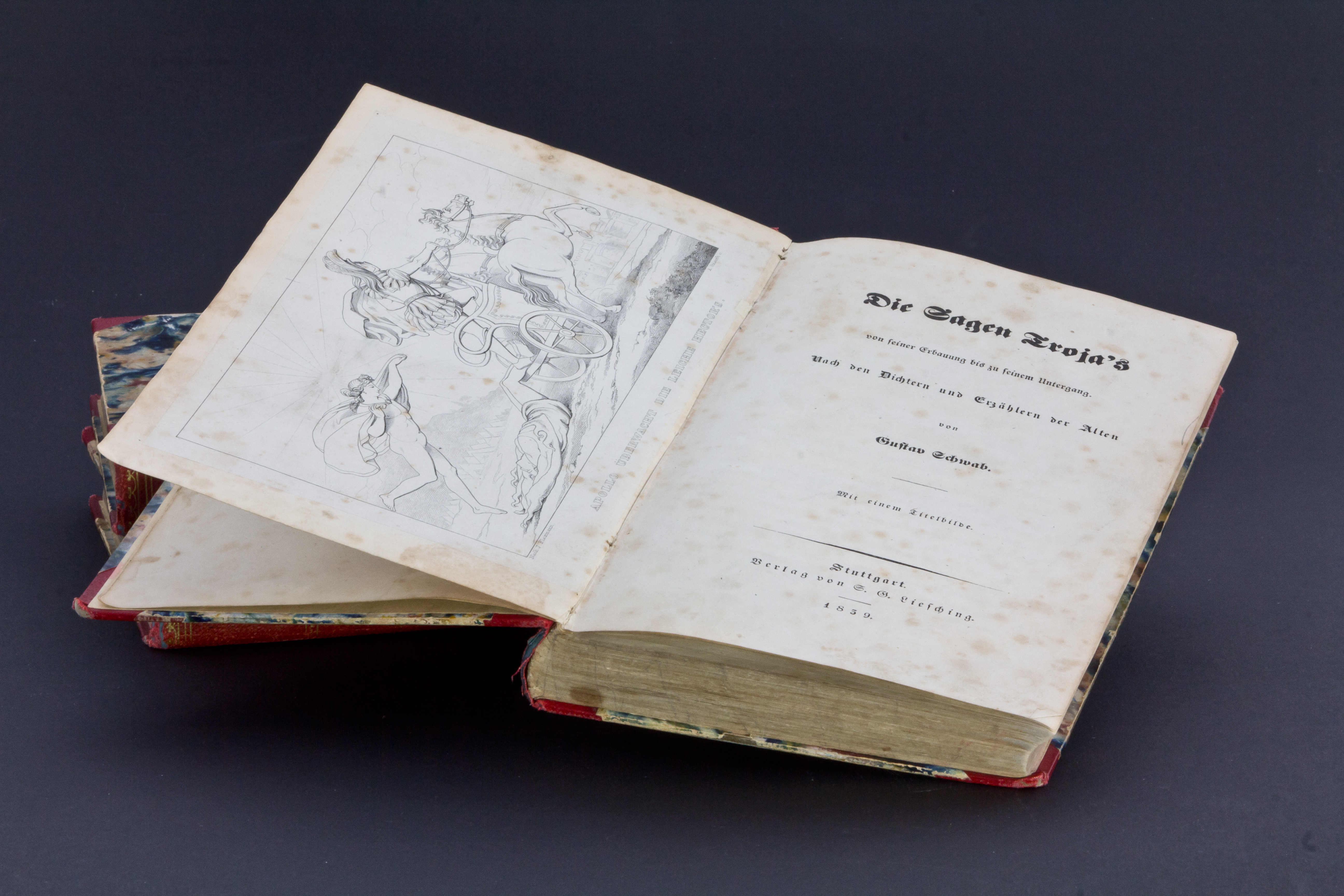 Die schönsten Sagen des klassischen Altertums, Gustav Schwabs, Erstausgabe Innentitel Troja